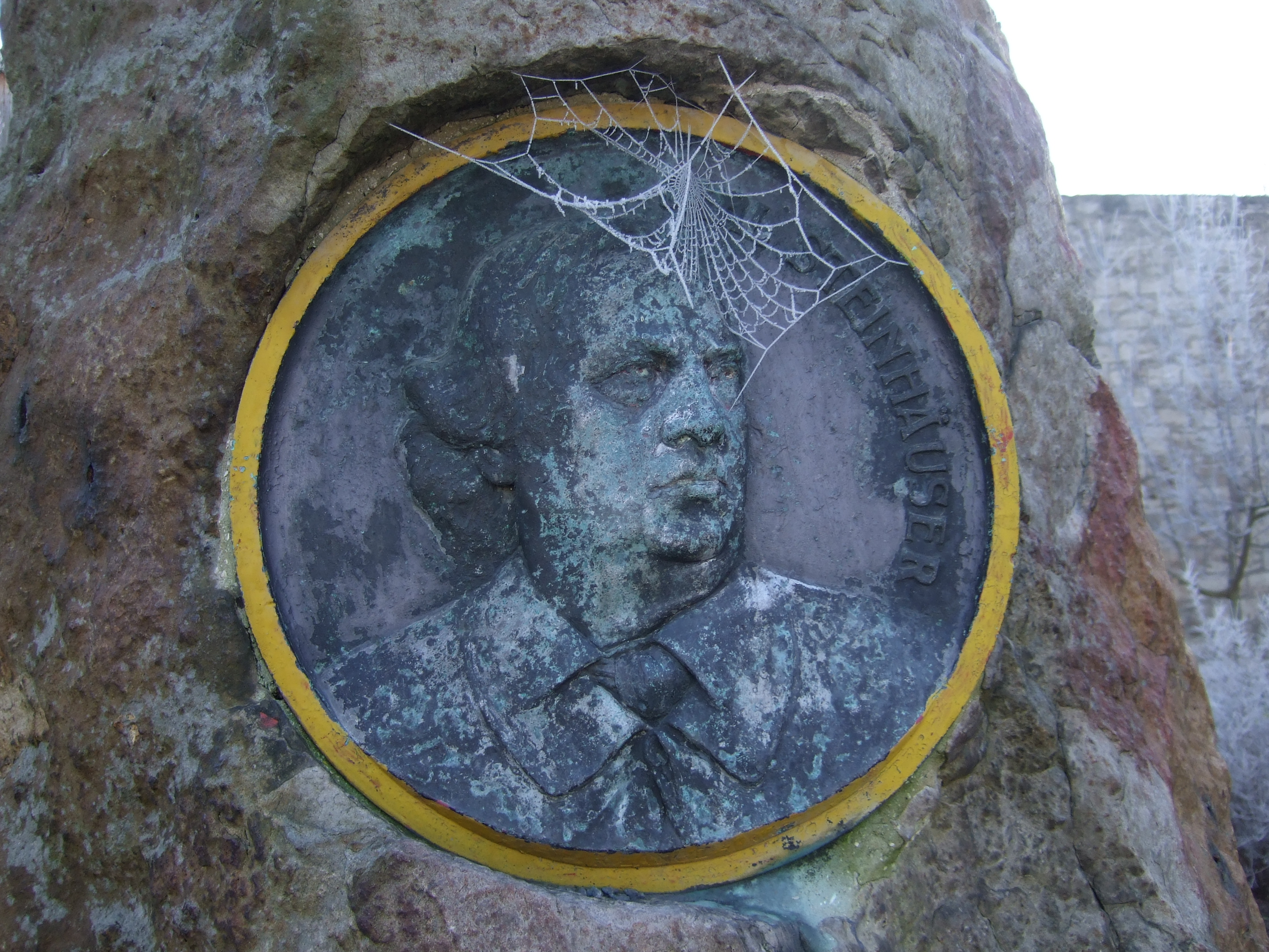 Karl Steinhäuser. Relief auf dem vom Männergesangverein Arion 1903 gestifteten Gedenkstein am Hirschgraben in Mühlhausen/Thüringen, Deutschland.